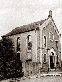 Foto der Synagoge in Erstein